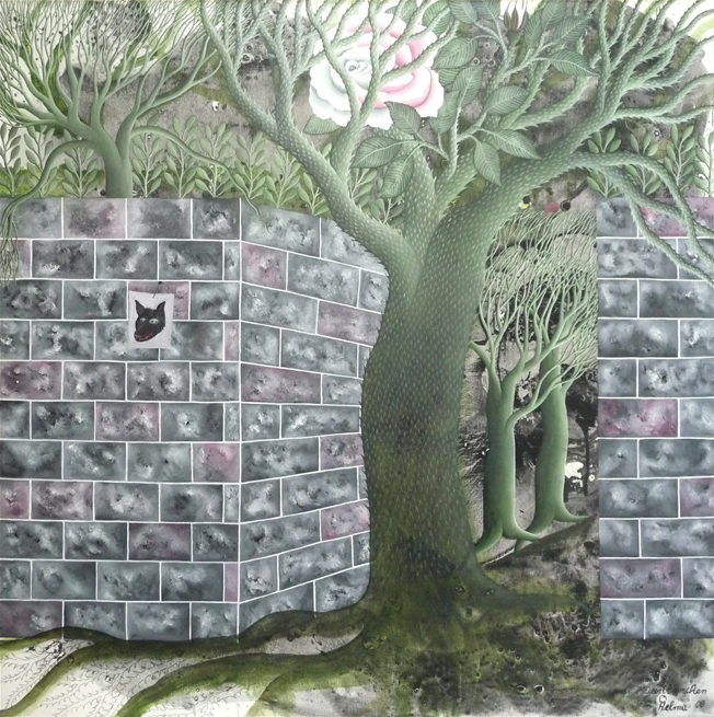 Die Aufnahme entstand am 15.9.2015 im Berliner Atelier von Helma.